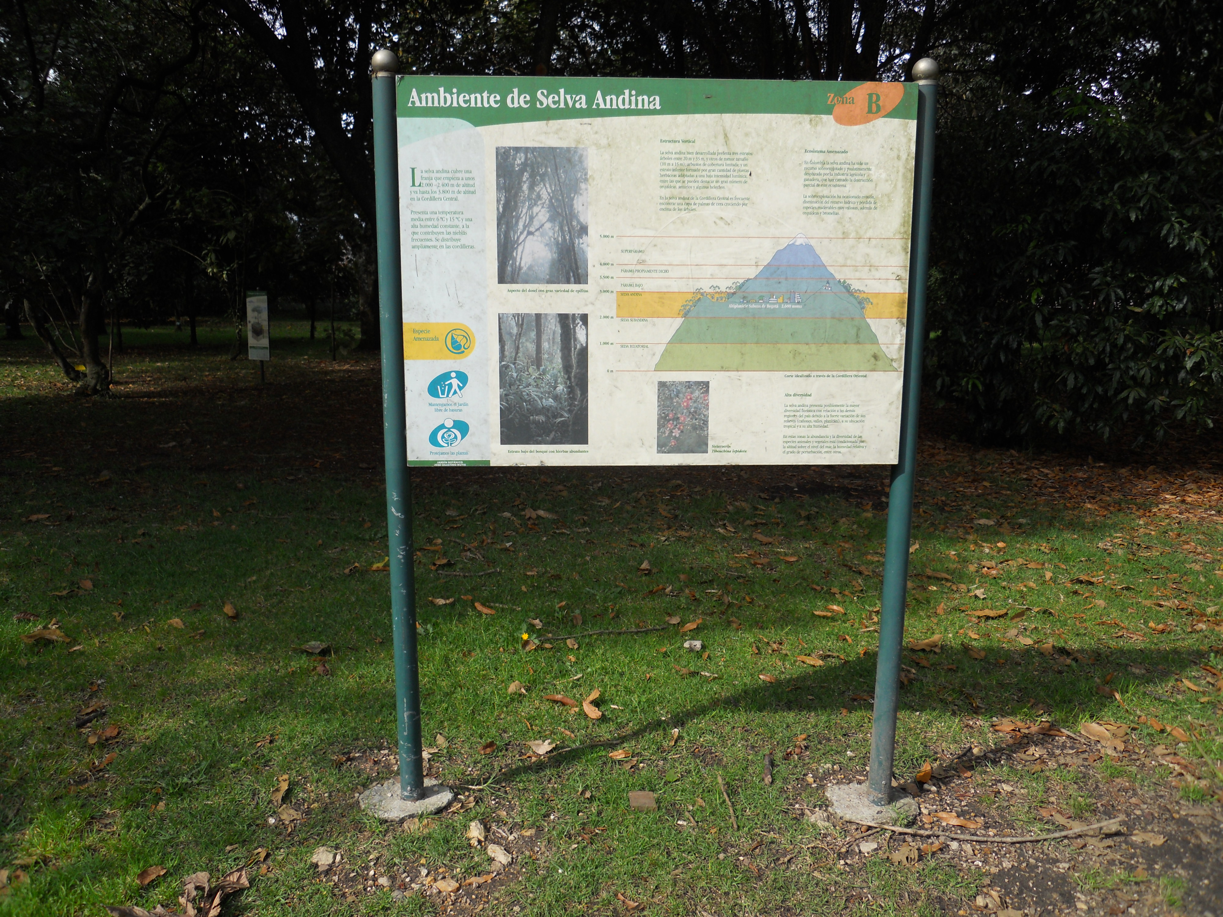 Letrero informativo en el Jardín Botánico de Bogotá.